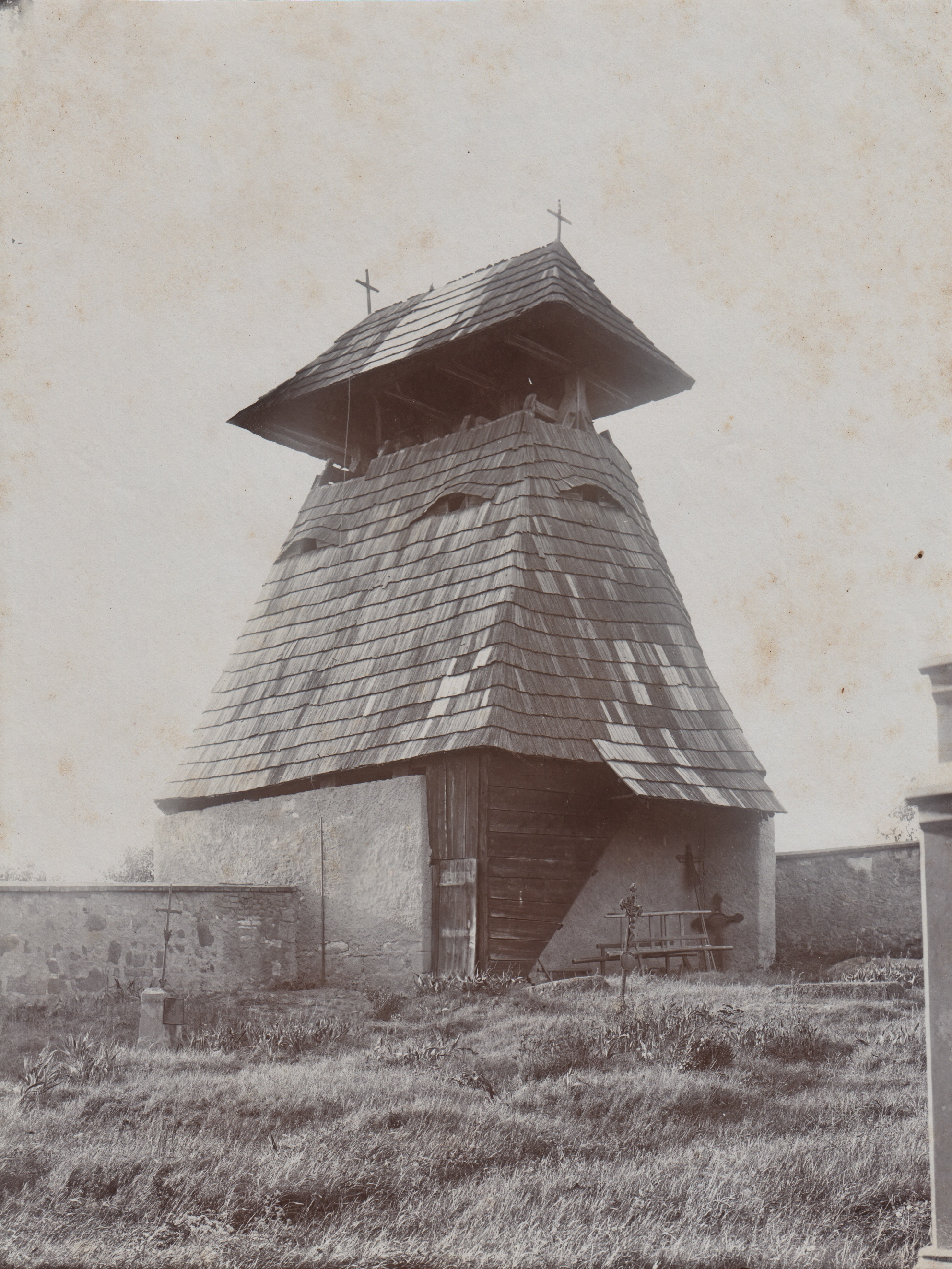 Kvílice, areál kostela svatého Víta, dřevěná zvonice.